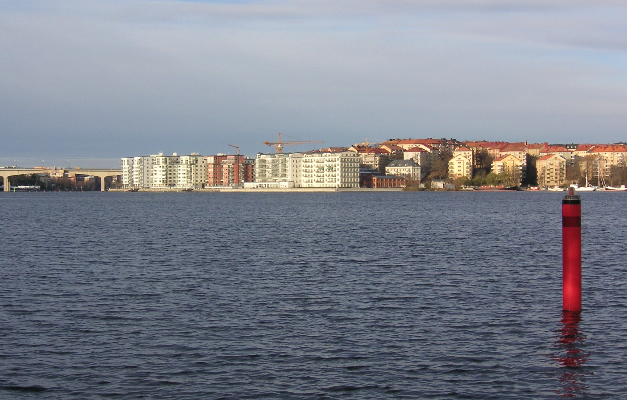 Lilla Essingen i Stockholm från Gröndal